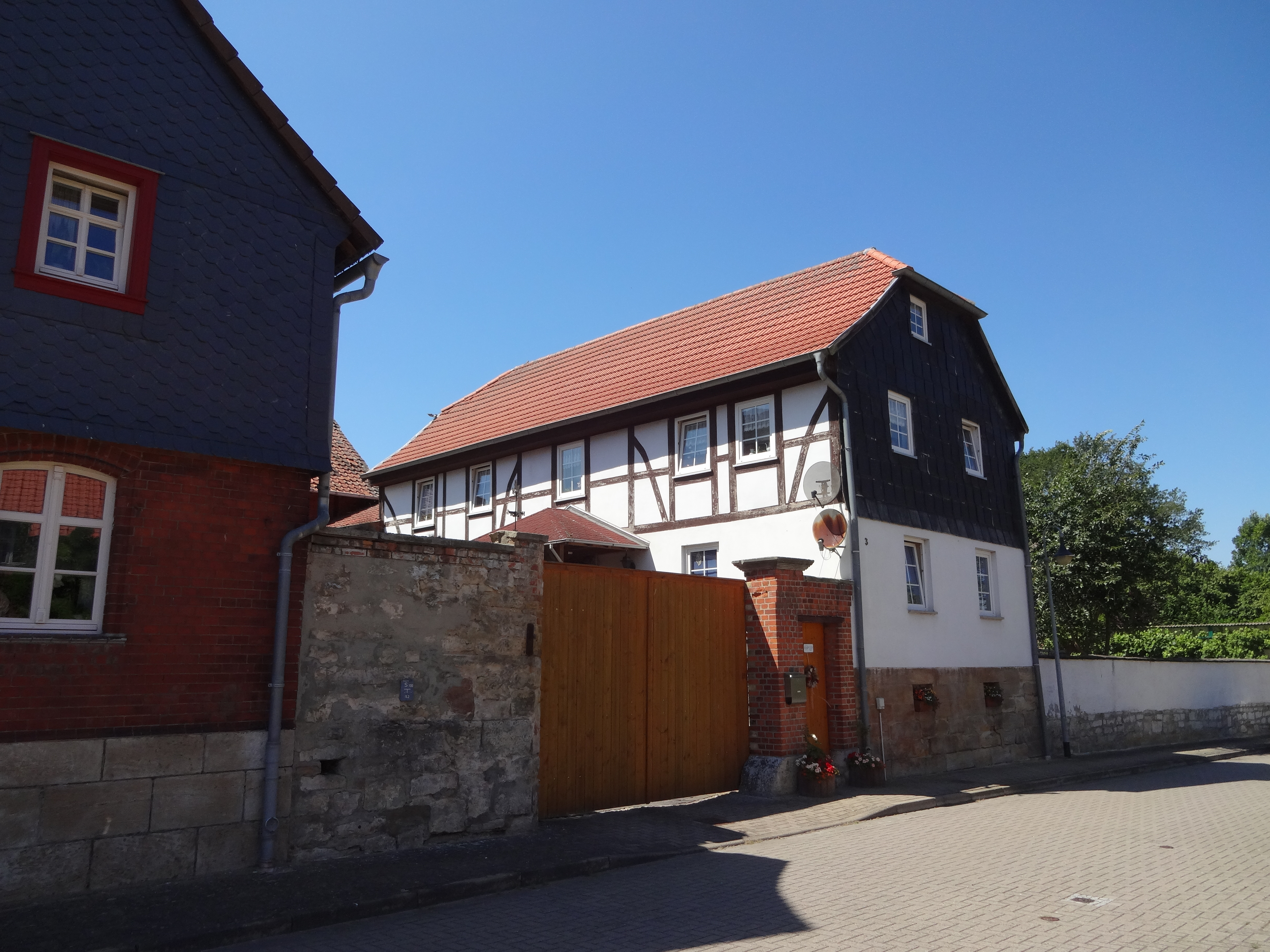 denkmalgeschützte Bauernhaus Am Bache 3 in Dedeleben.